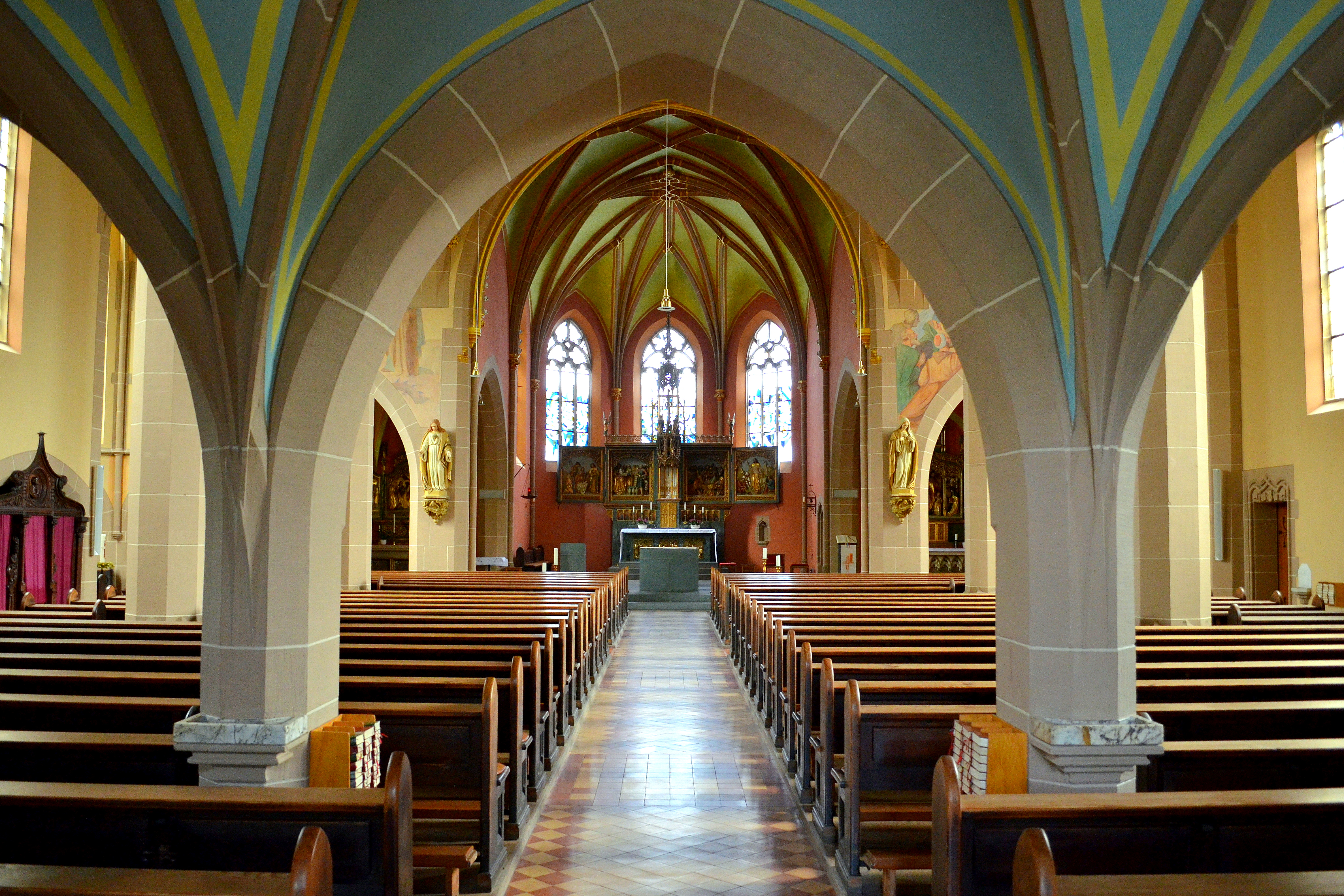 Interieur